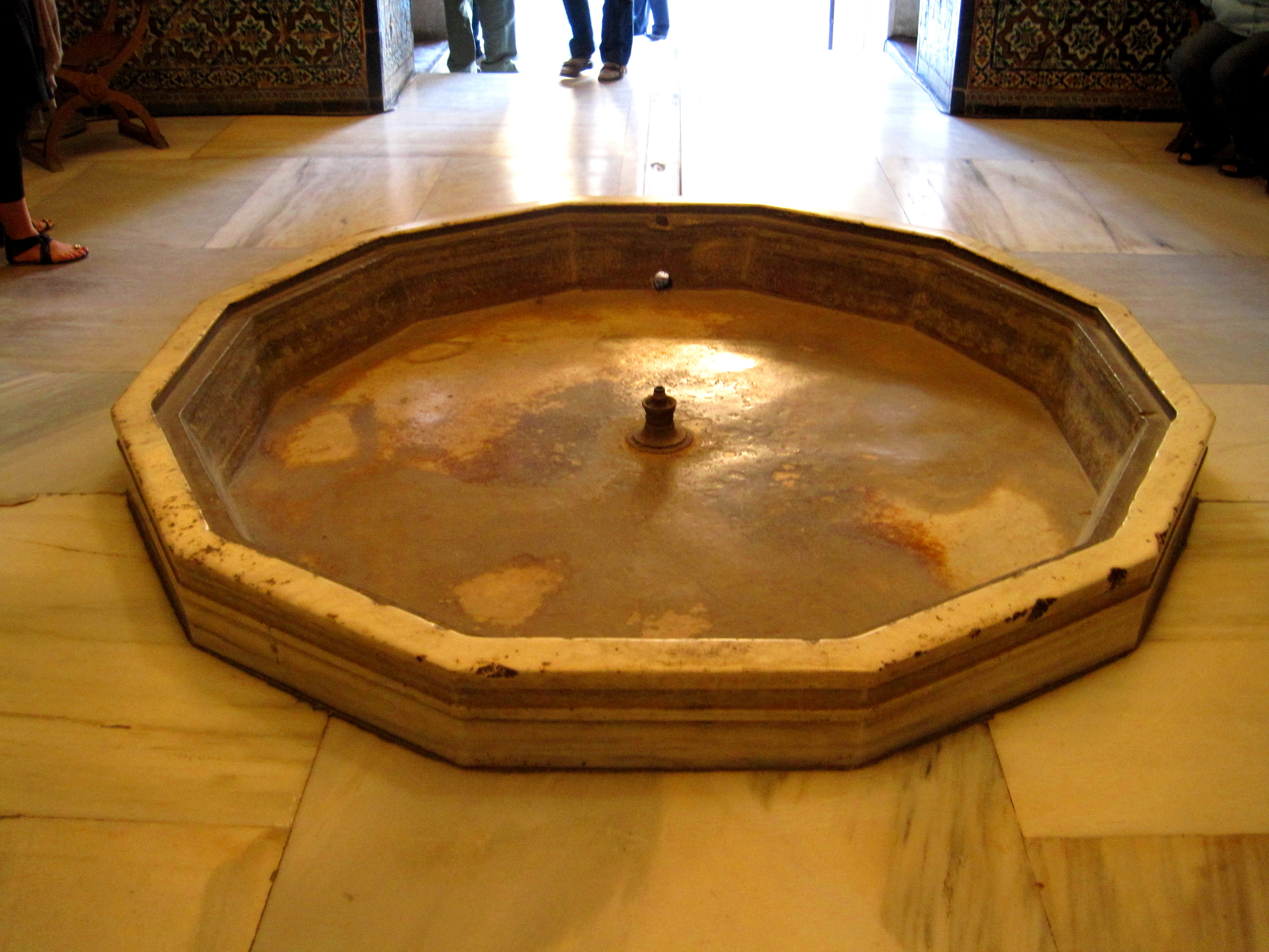 Sección 3.2.1.7 Sala de los Abencerrajes